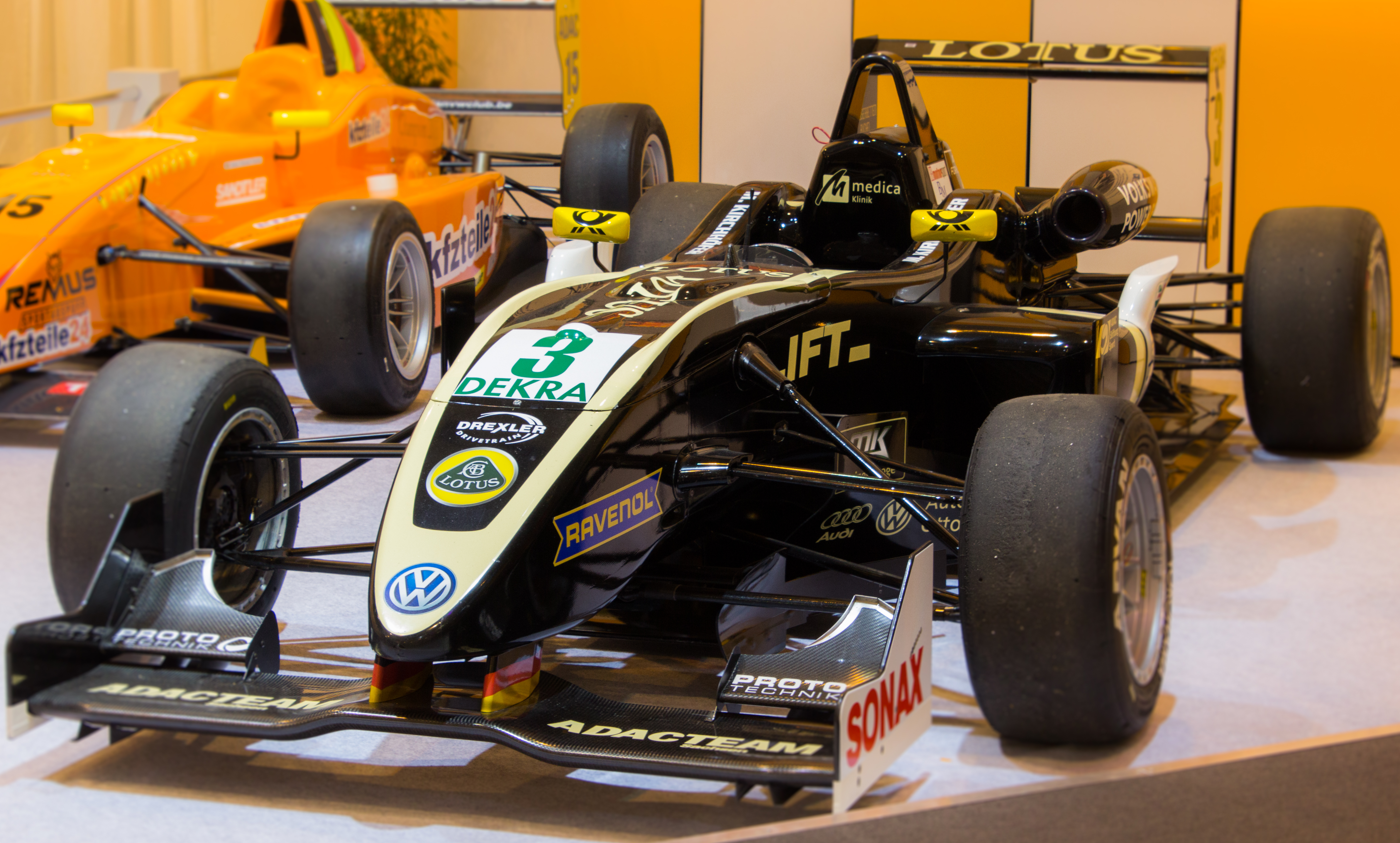 Der Dallara F308 von Marvin Kirchhöfer, ausgestellt auf der Essen Motor Show 2013